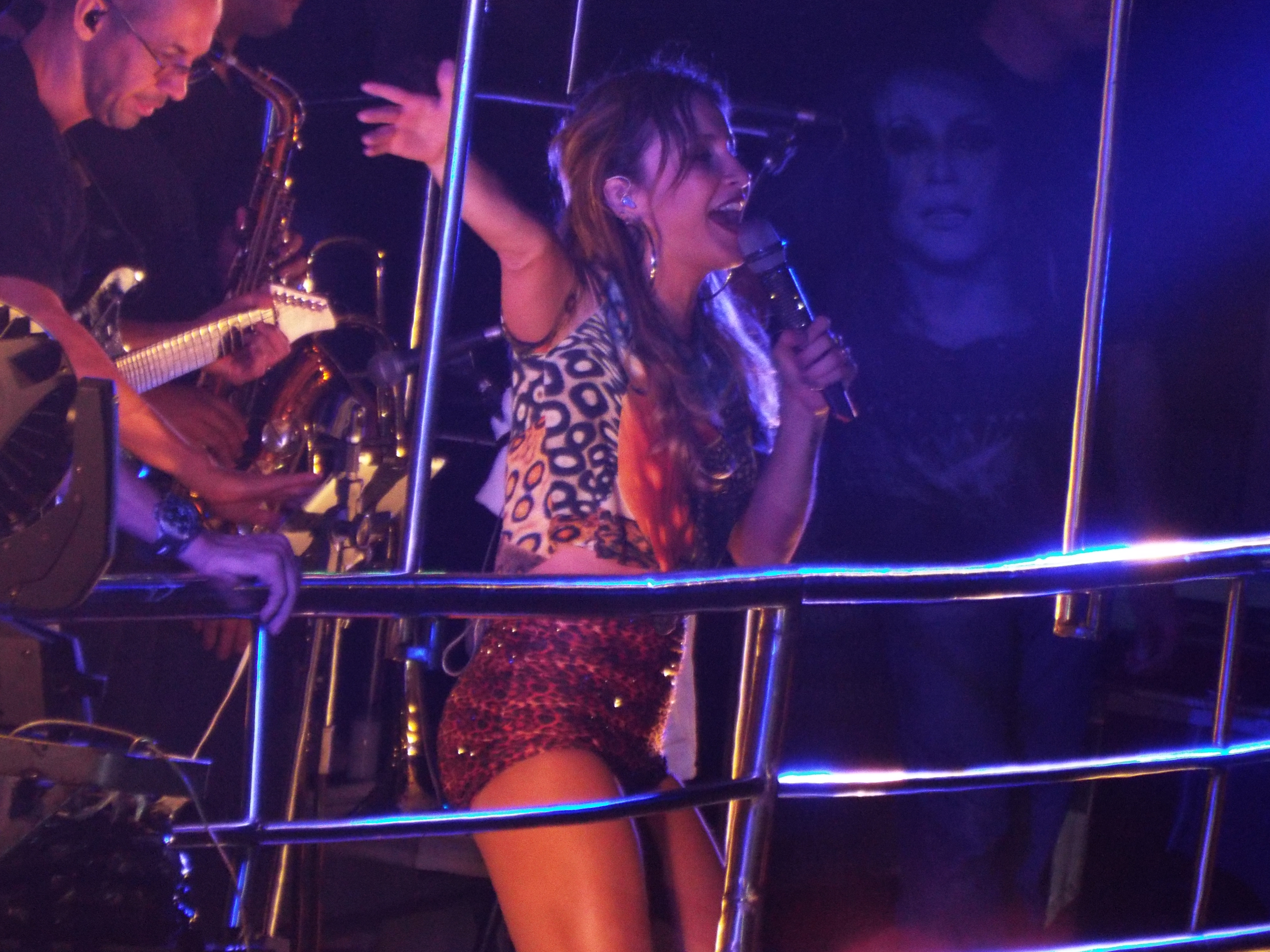 Micareta Feira